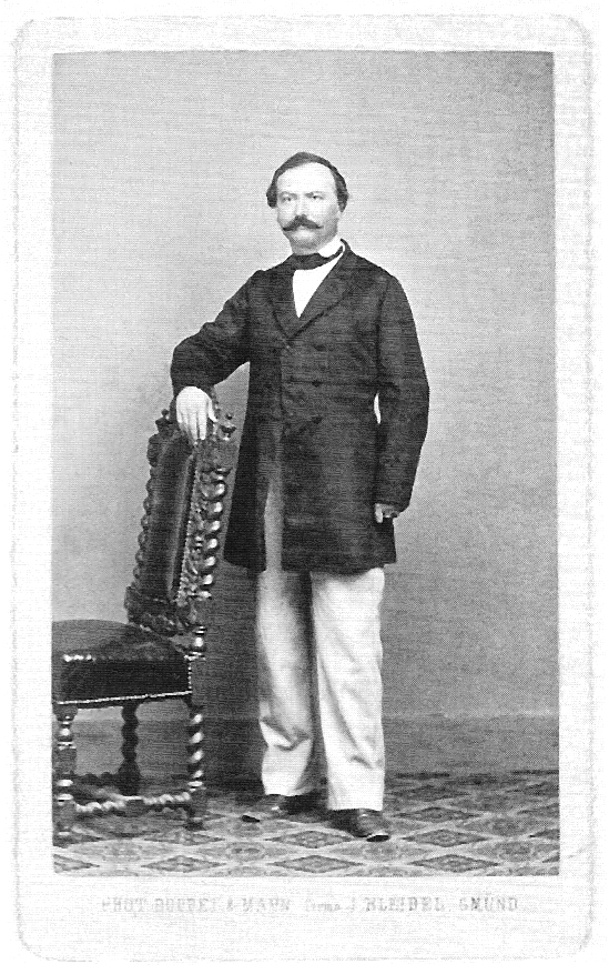 Wilhelm Kohn, Stadtschultheiß von [Schwäbisch] Gmünd (1815–1877).